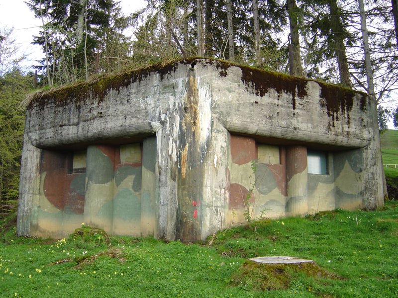 Maschinengewehrbunker Raten 7, Kt. Zug : A07189 Infanteriebunker St. Jost Raten 7 (2 MG)